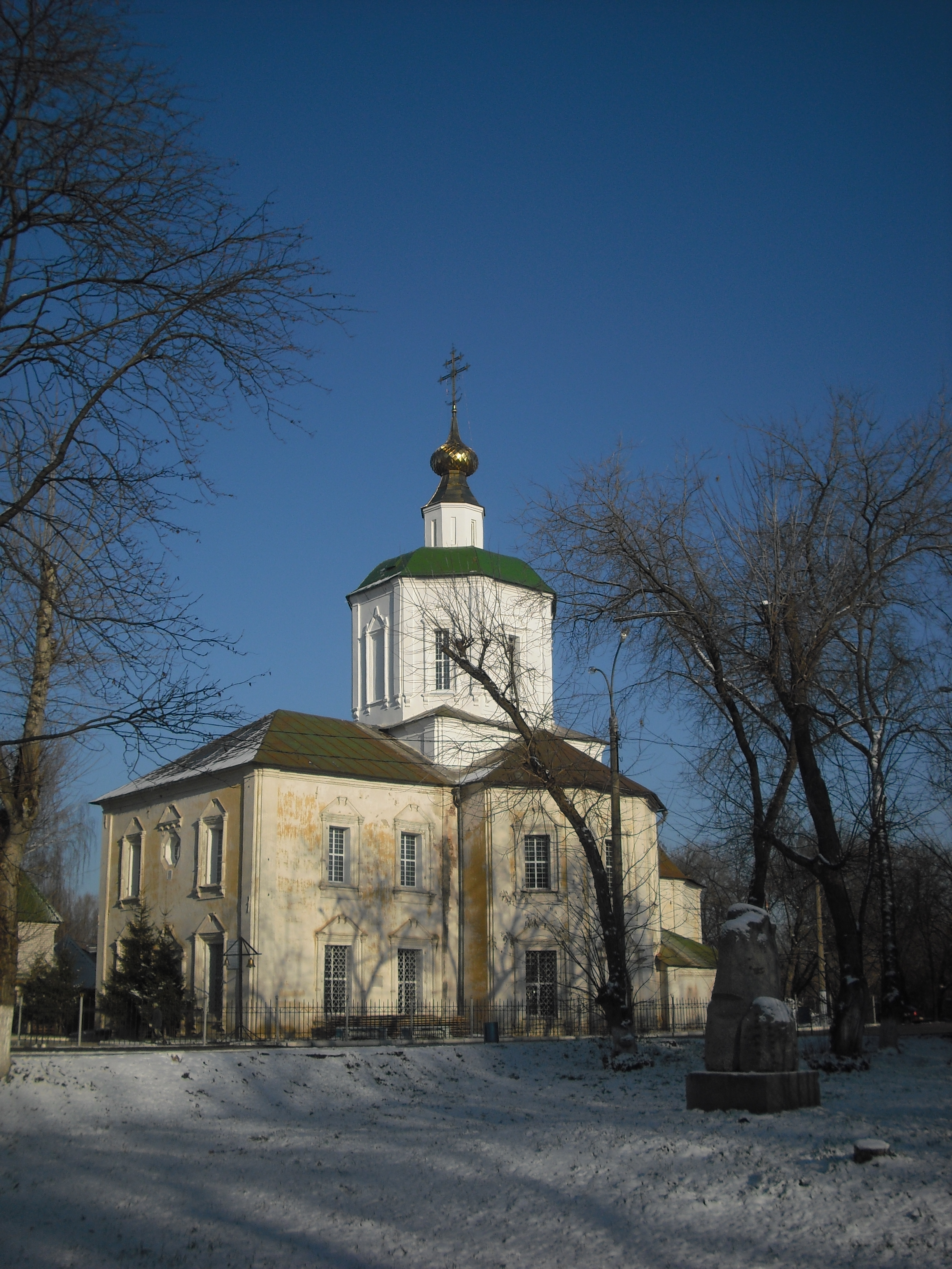 Успенский собор в Твери